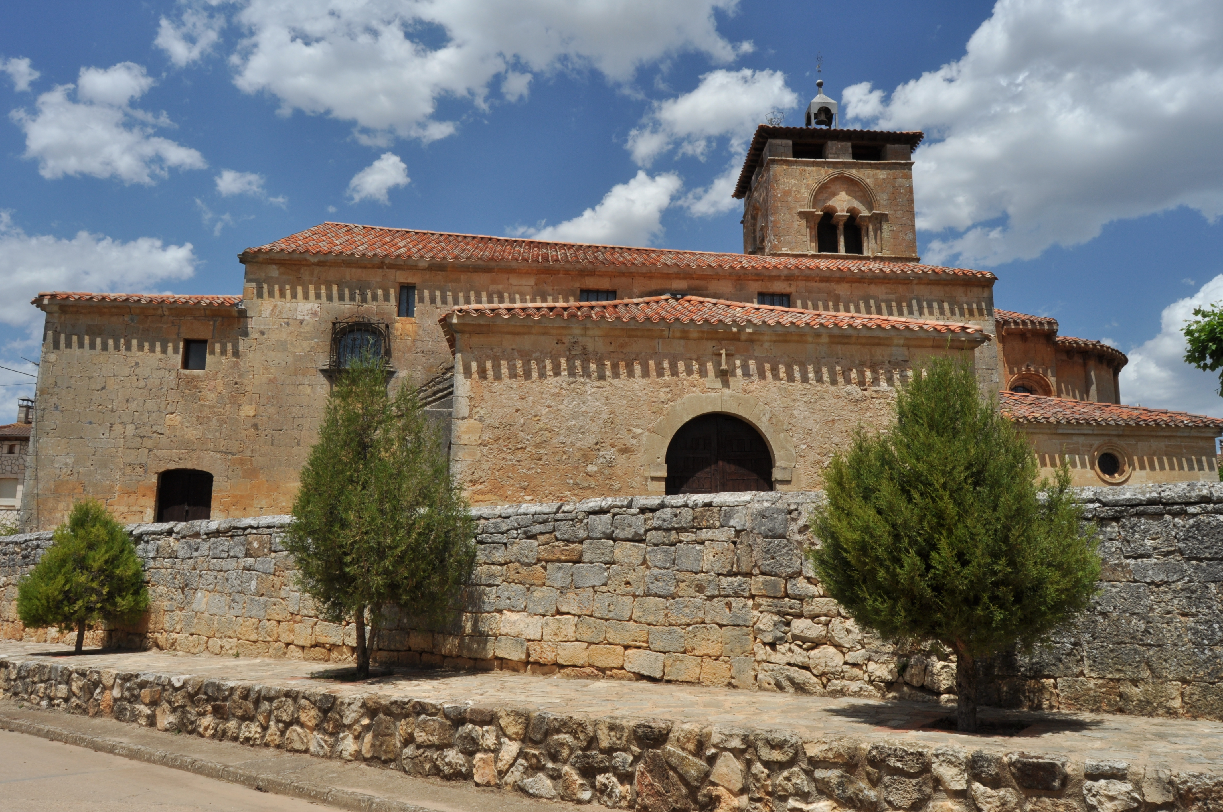 Espinosa de Cervera - 001